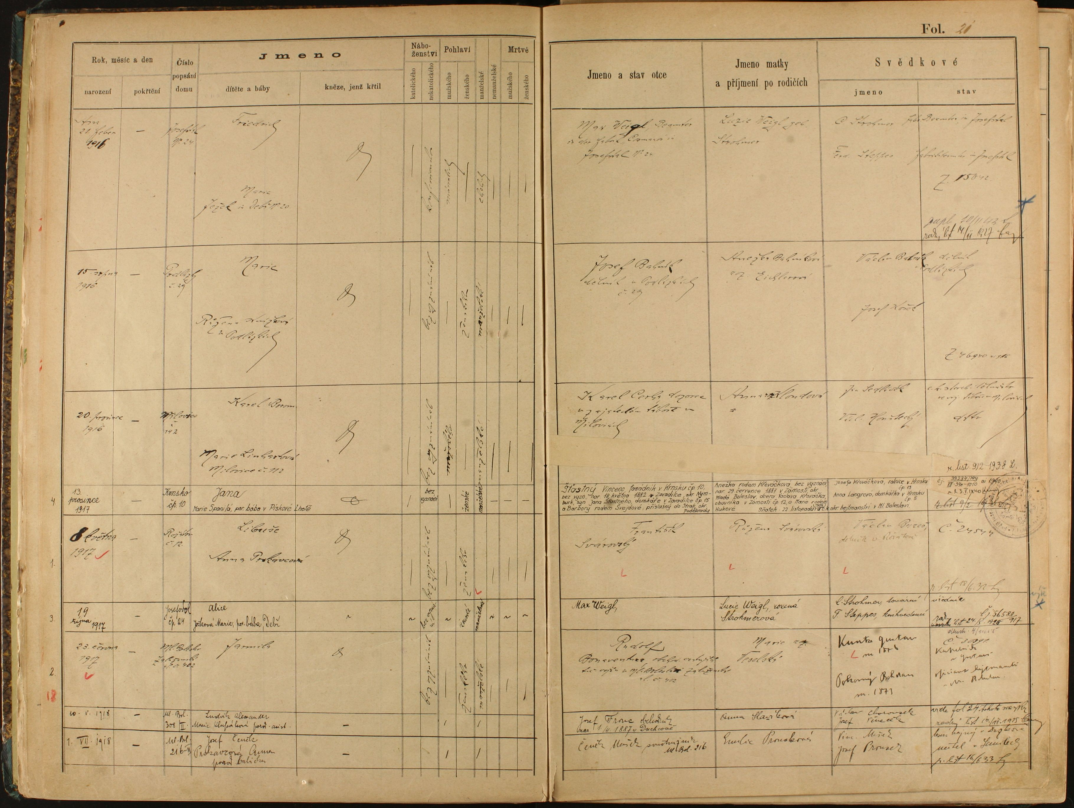 Stránka 19 z matriční knihy Mladá Boleslav-oú 01. SOA Praha